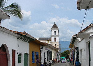 Yo propiamente La edite Bella imagen de Nuestro pueblo